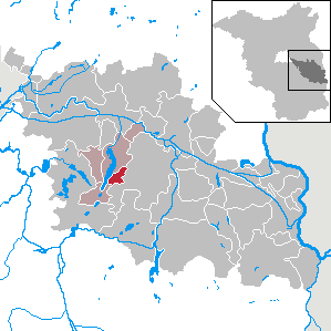 Diensdorf-Radlow in Brandenburg (Country) - District Oder-Spree